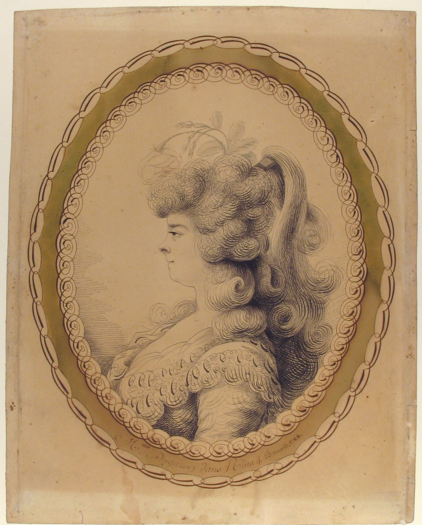 Buste de profil de Madame Dugazon dans le role de Nina regardant sur sa droite